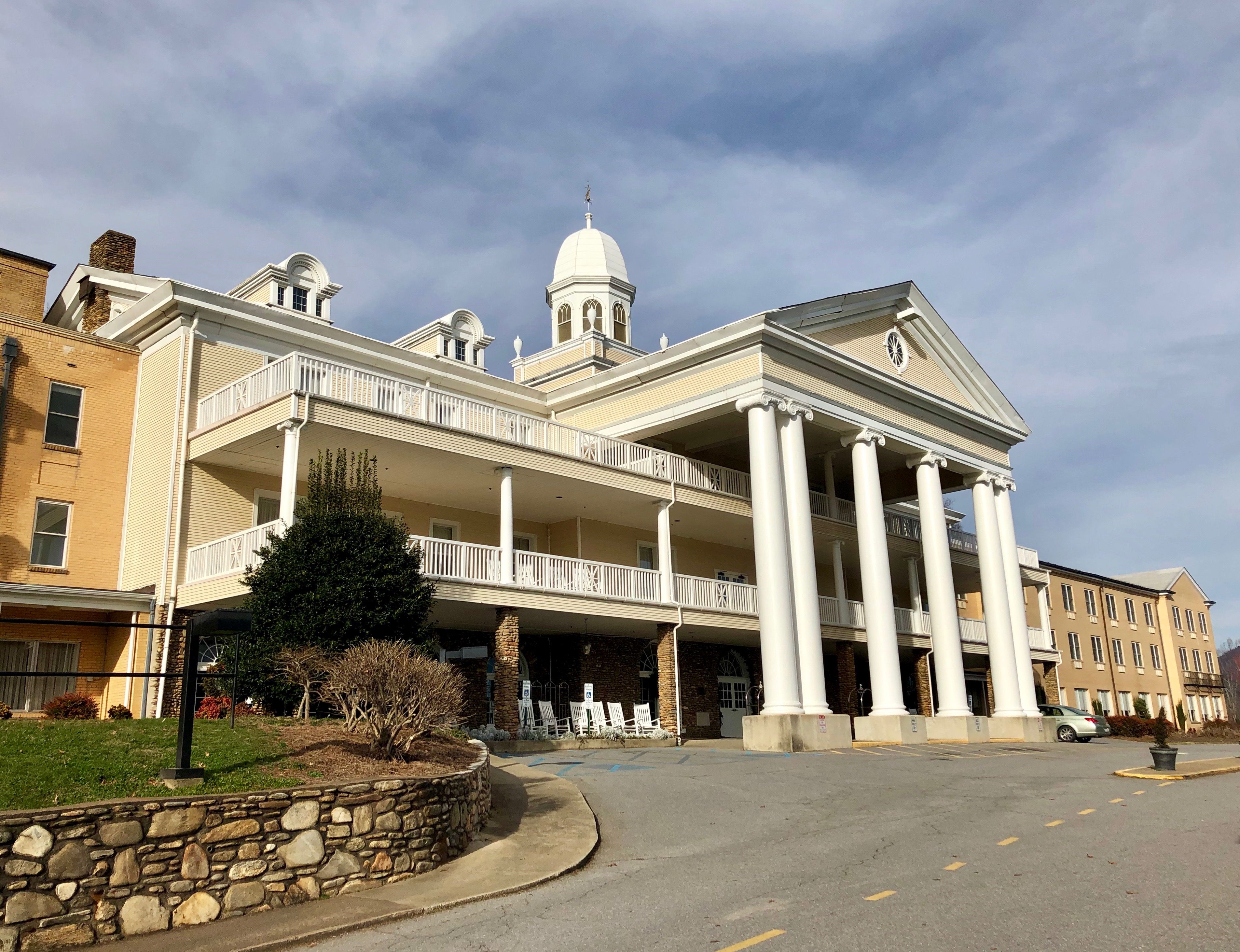 Lambuth Inn, Lake Junaluska, NC